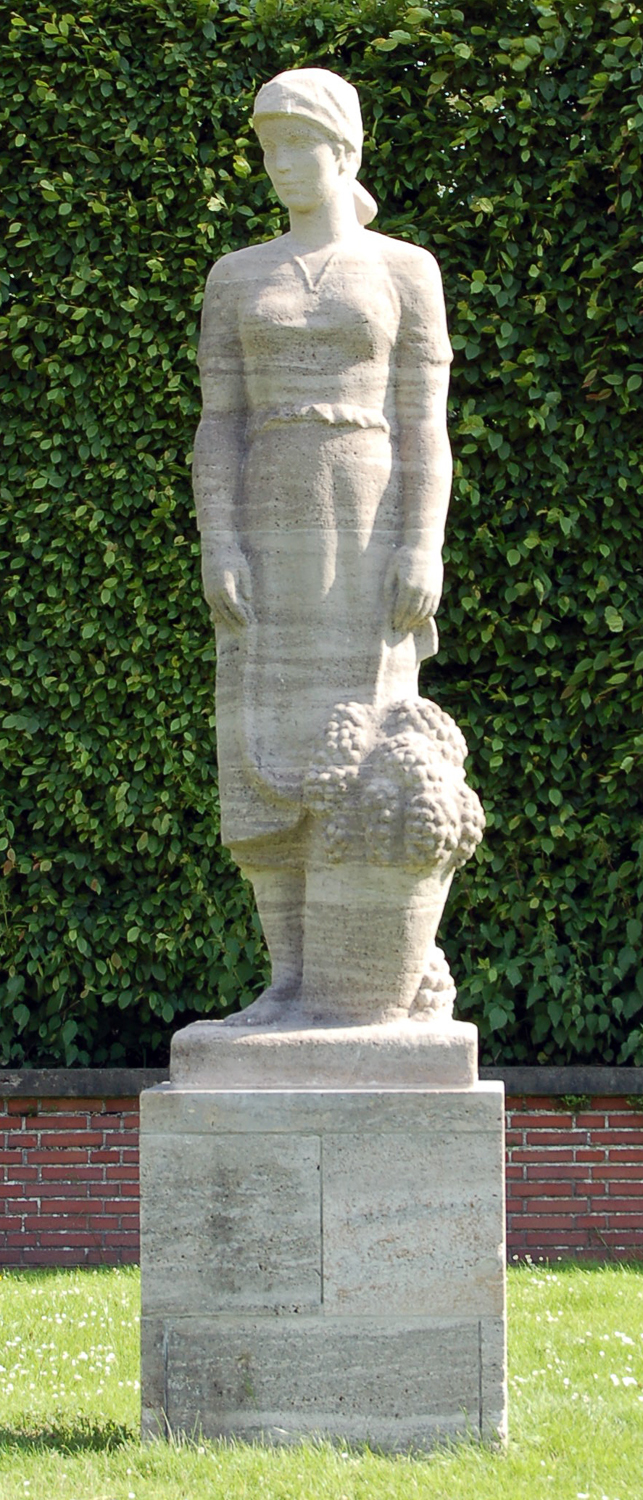 Nordpark Düsseldorf, Skulptur der Gruppe "Die Ständischen" Die Winzerin von Alfred Zschorsch